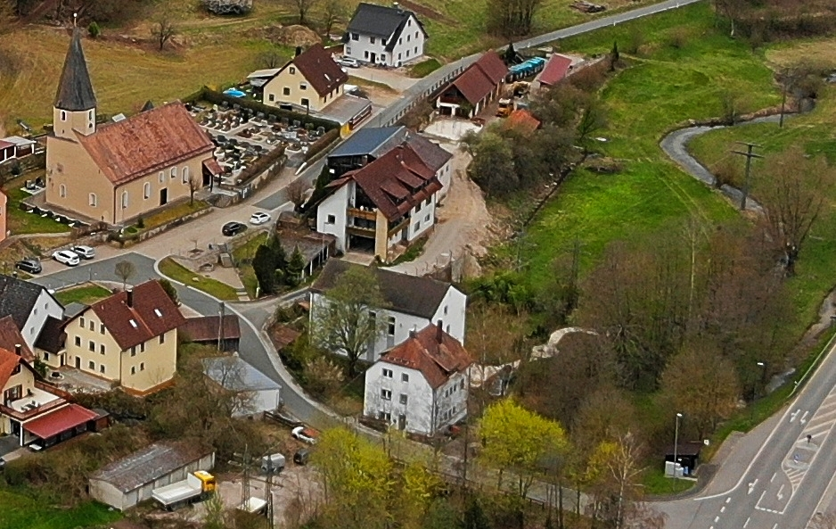 links: Filialkirche St. Felicitas, Bildmitte unten: Studio Untertrubach, rechts Trubach Blick von Osten